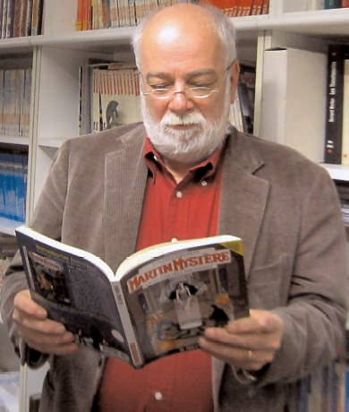 Alfredo Castelli mentre legge Martin Mystere 292 "Il sole nero"